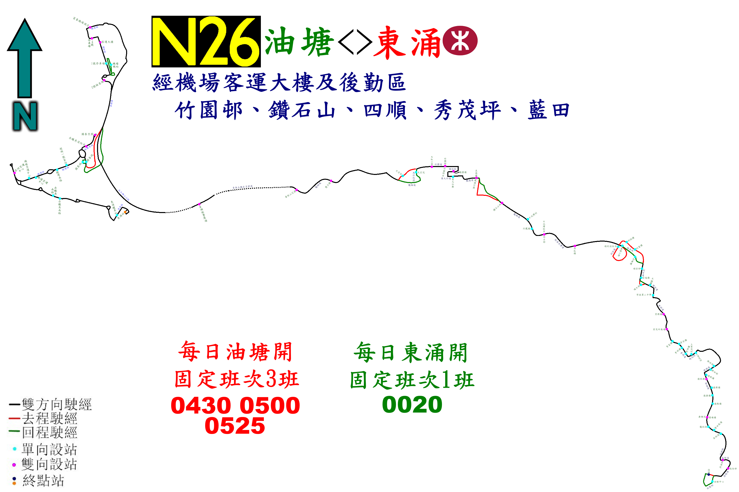 中文（香港）: 城巴N26線的走線圖